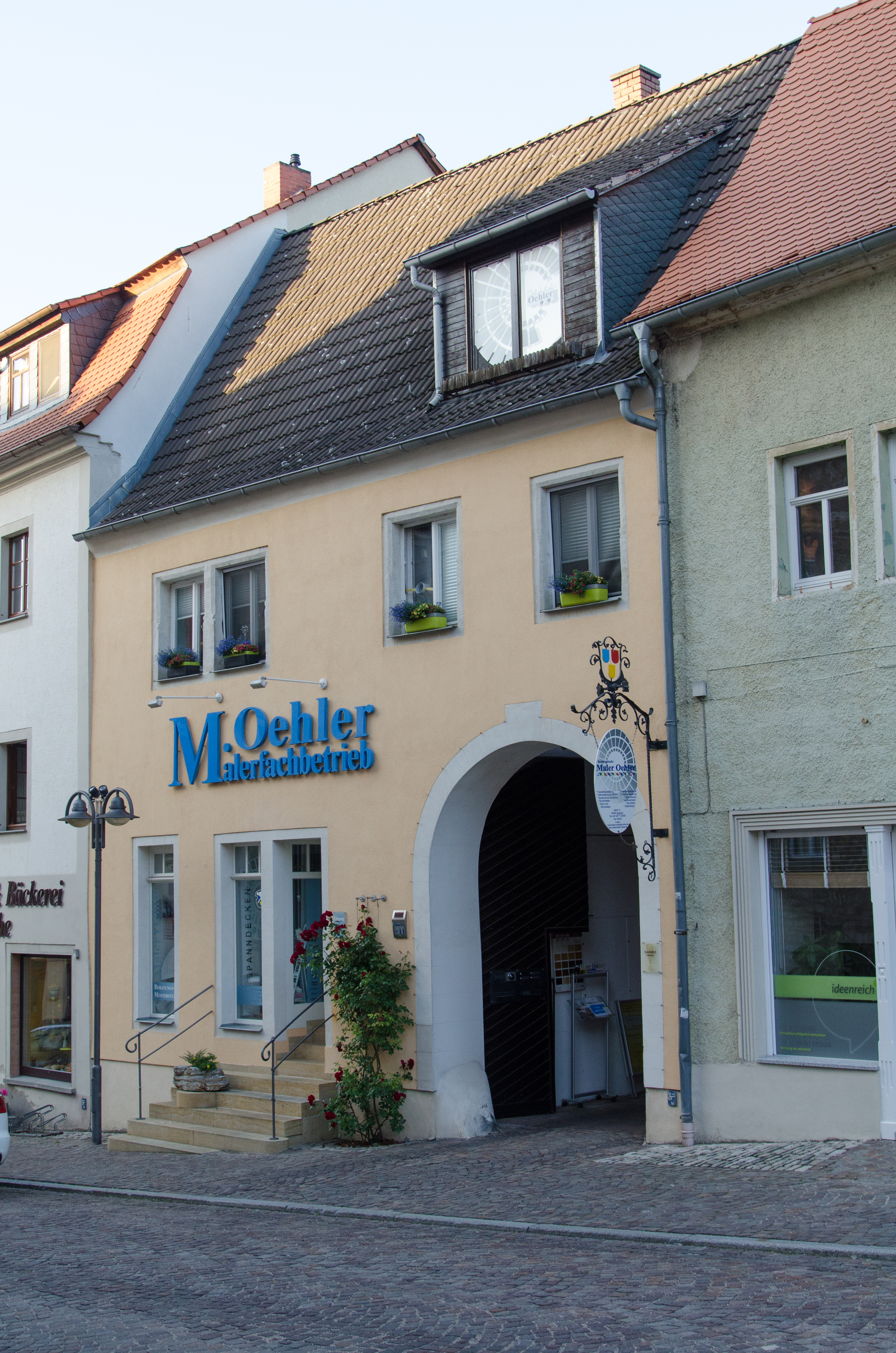 Querfurt, Markt 10